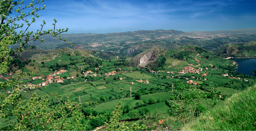 Paisaje de Peñerudes, foto hecha desde La Mostayal, Asturias. Al fondo se ve Oviedo.